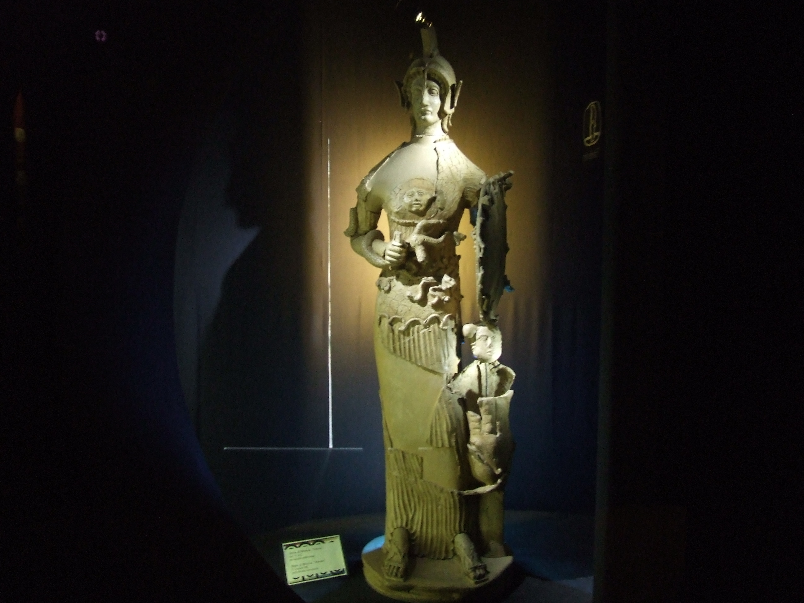 Statua di Minerva Tritonia. Terracotta policroma. V secolo a.C. - Museo Archeologico Lavinium